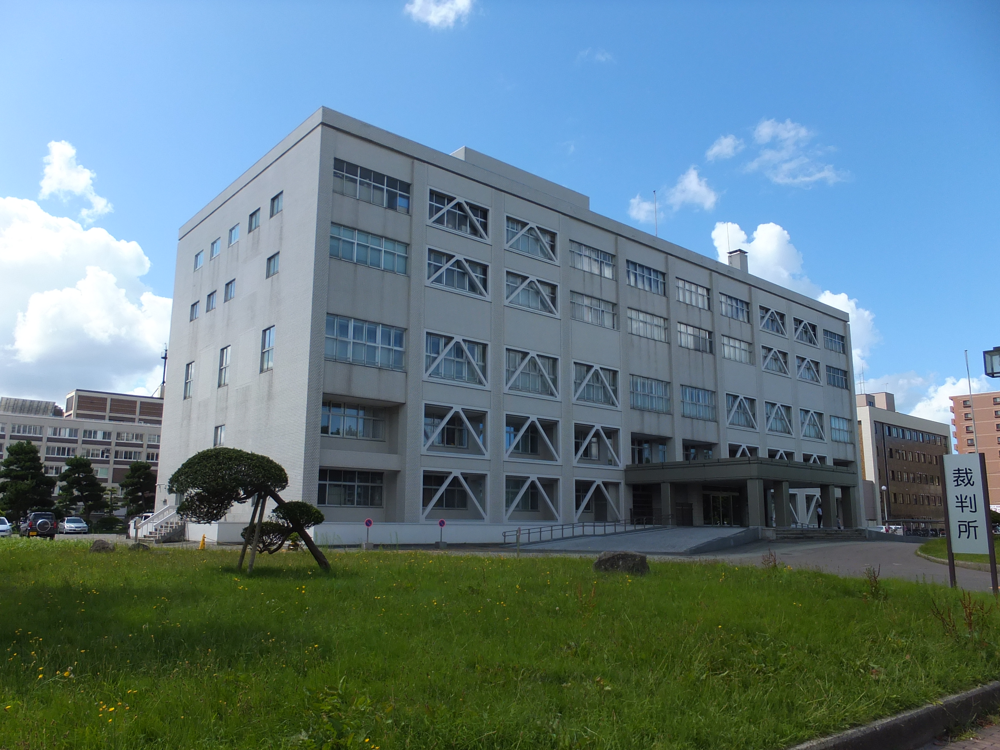 秋田地方裁判所。建物内にはこのほか仙台高等裁判所秋田支部、秋田家庭裁判所、秋田簡易裁判所が入る（秋田市山王）。